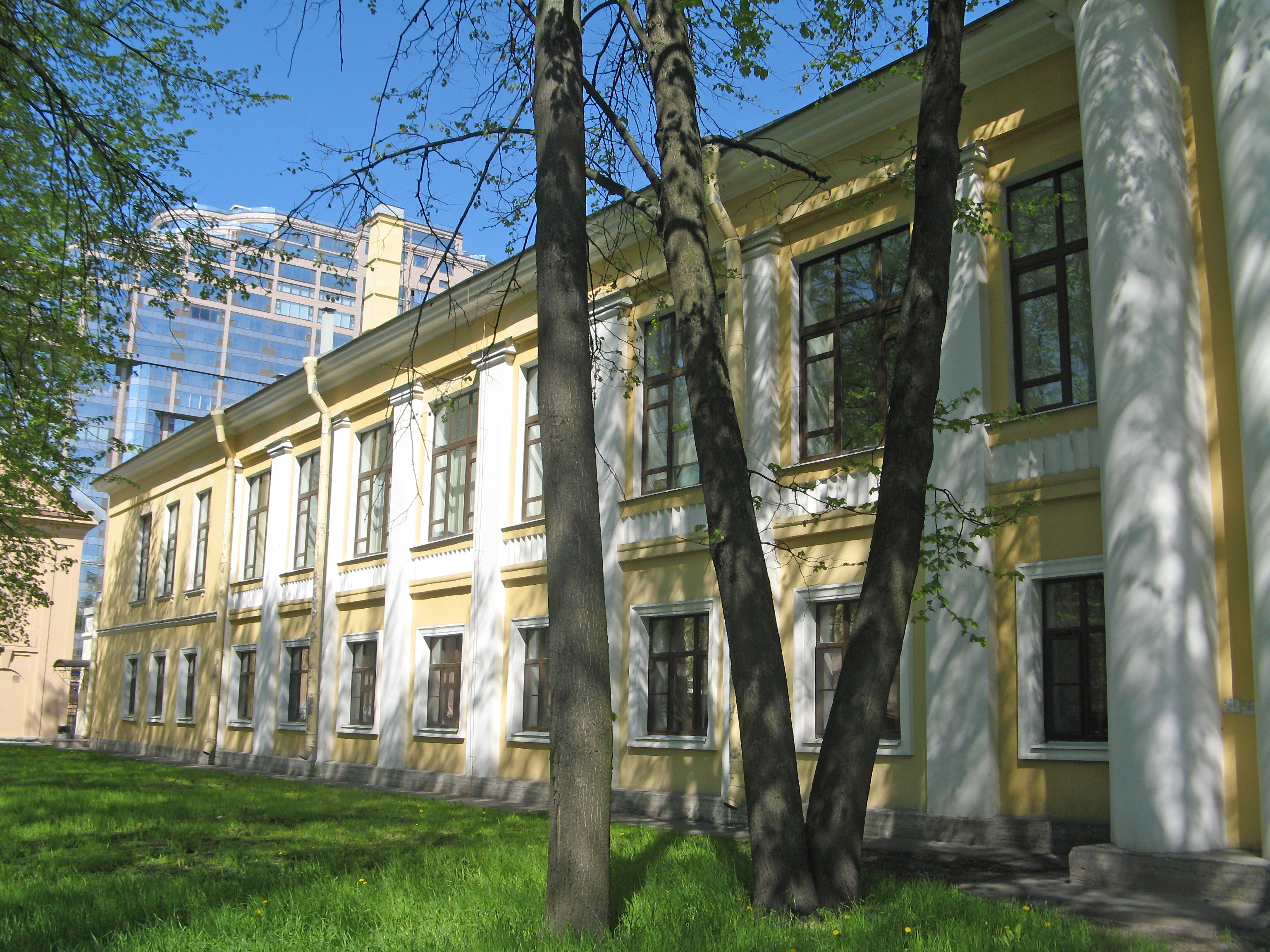 Санкт-Петербург, Клиническая улица 7 корпус 1. Клинический отдел ВМА